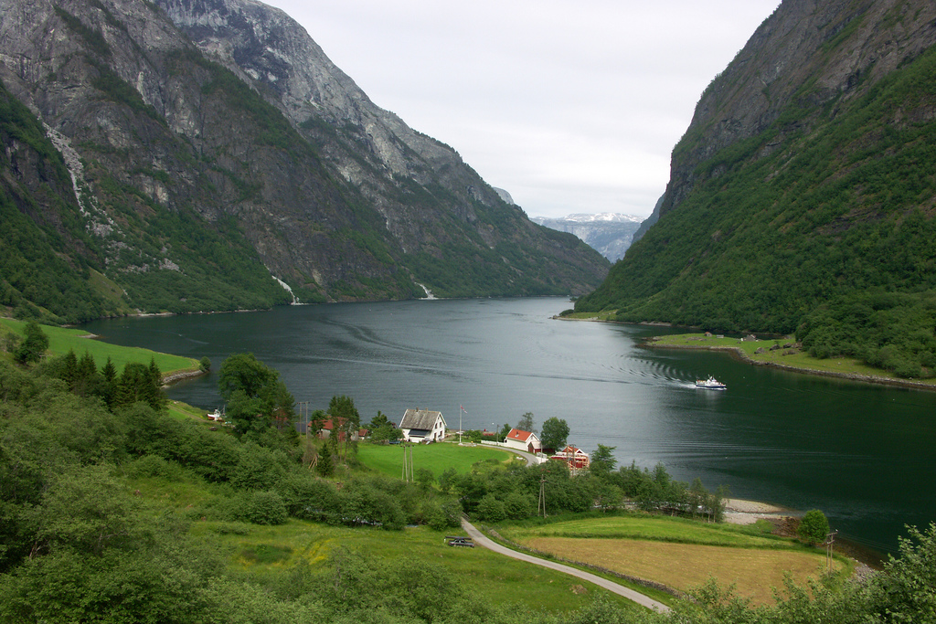 Tufto i Nærøyfjorden